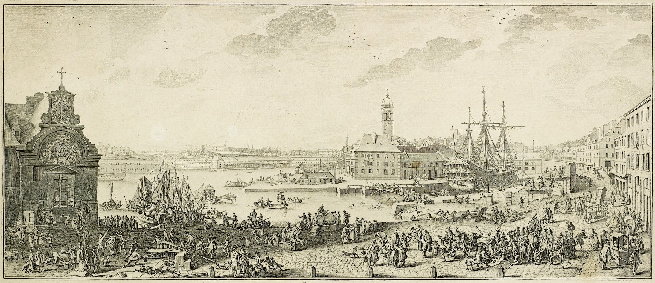 Vue du port de Brest vers le fond de la Penfeld avec Recouvrance à gauche et la Tour de l’Horloge au centre du tableau, la maison de l’Intendant étant juste devant avec un trois-mâts en cale de radoub. Eau-forte, 32 x 63 cm, Musée des beaux-arts de Brest métropole océane.